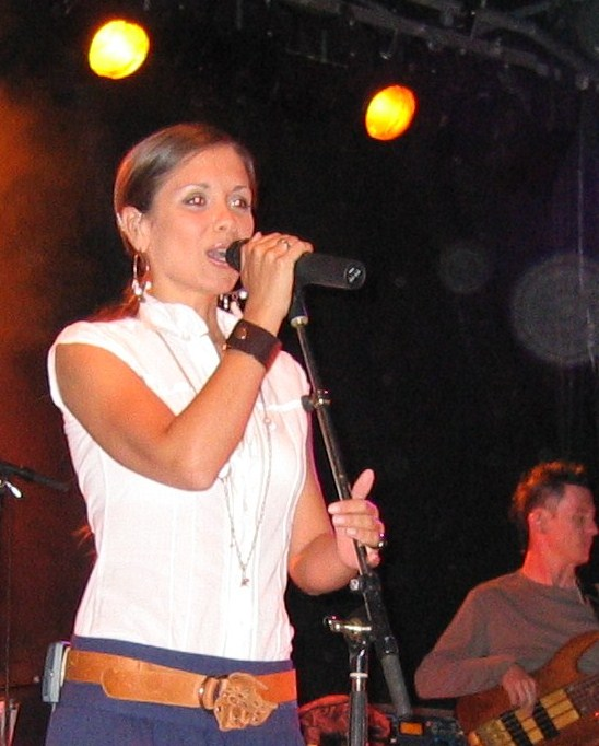 Veronica Codesal, chanteuse et musicienne (Ialma, Urban Trad)